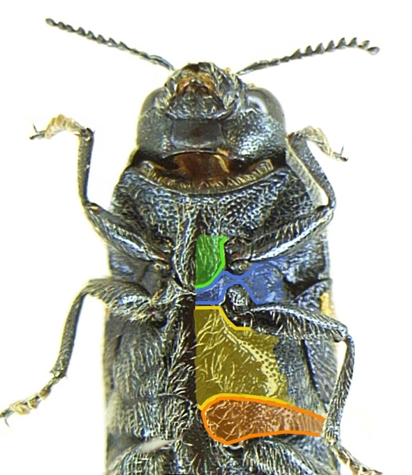 Detail of Ptosima flavoguttata grün: Prosternalfortsatz der Vorderbrust ocker: Hinterbrust